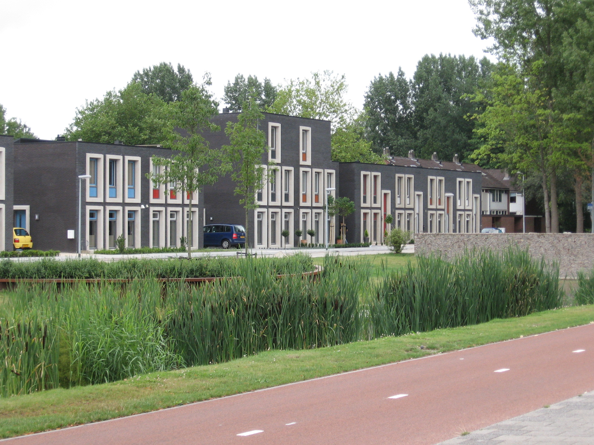 Foto van het gebied waar vroeger de Toplichtflat stond.